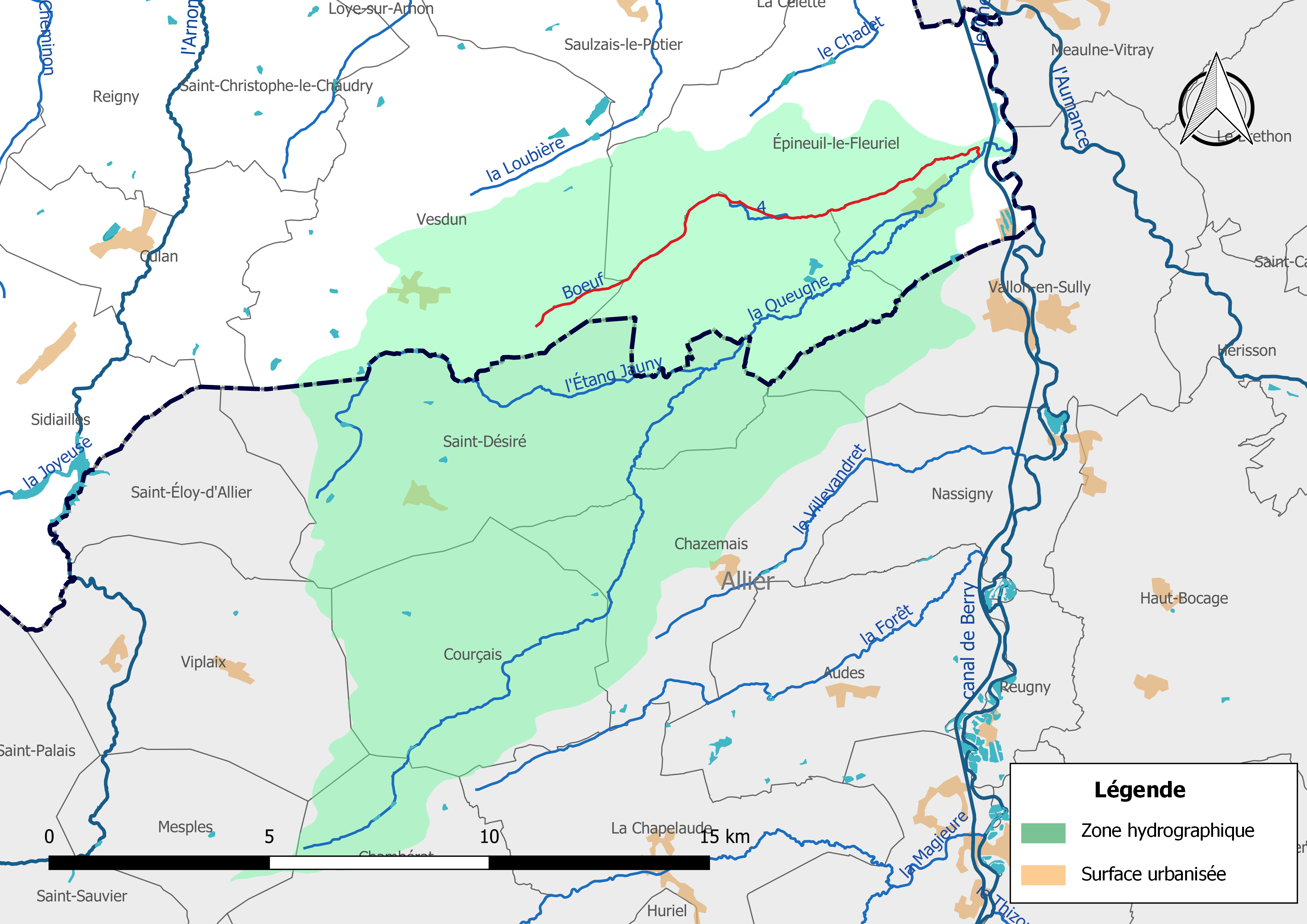 Carte du « ruisseau du Boeuf » (France) et de la zone hydrographique dans laquelle il s'insère.